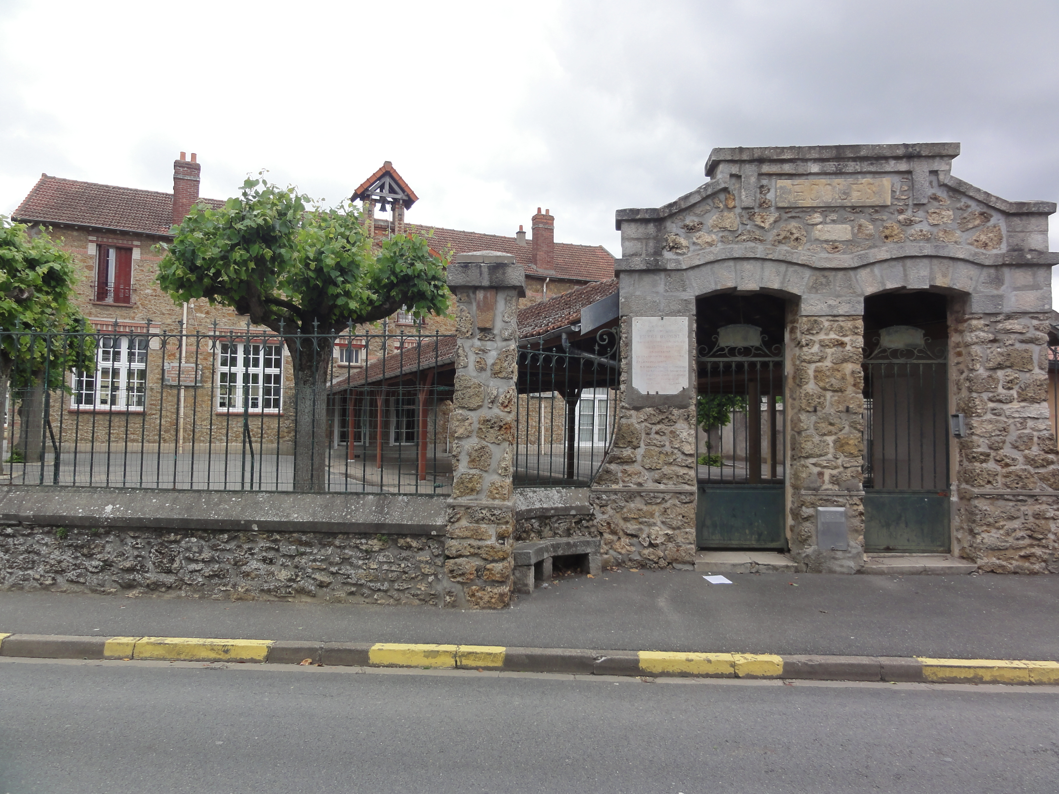 Cheptainville (Essonne) Écoles, entrée .